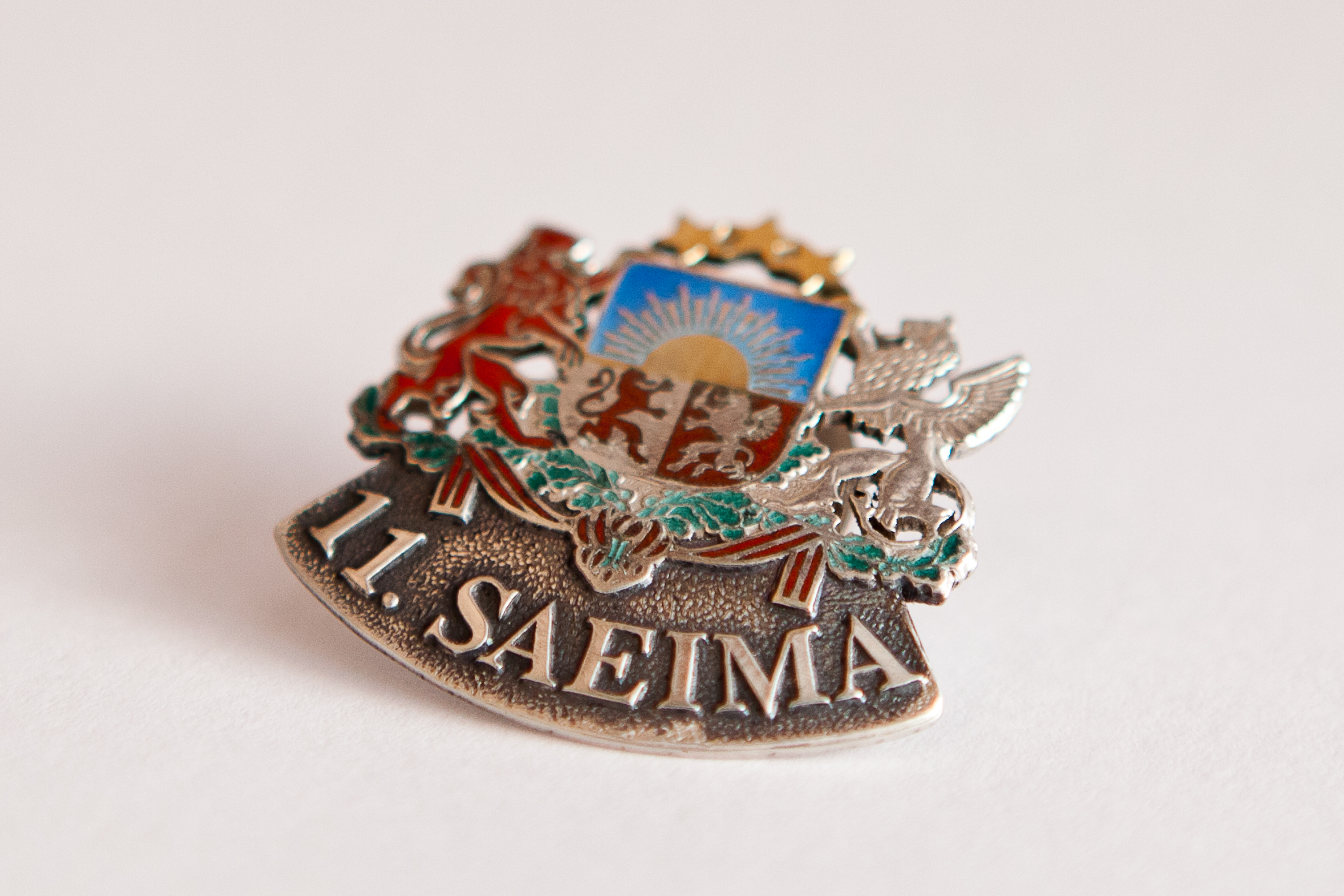 2011.gada 14.oktobris. Reģistrējoties pirms pirmās sēdes, 11.Saeimas deputāti saņems šādu nozīmīti Foto: Ernests Dinka, Saeimas Kanceleja